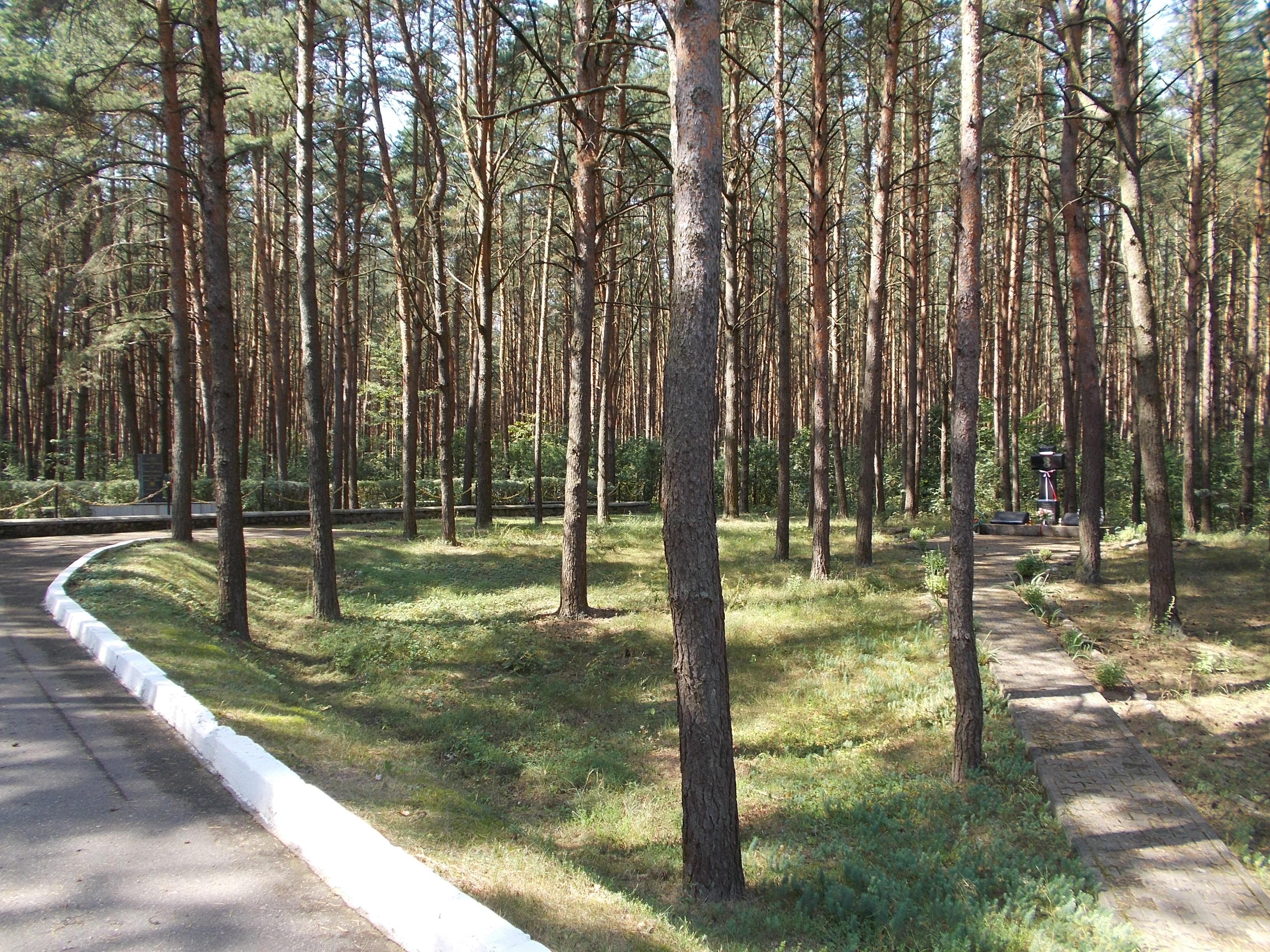 Las Borek w okolicy Berezwecza, (ob. w granicach m. Głębokie w obwodzie witebskim) Po lewej zbiorowa mogiła upamiętniająca 2500 Żydów z Głębokiego i okolic. Po prawej grób Polaków, ofiar Hitleryzmu w 1942 r.